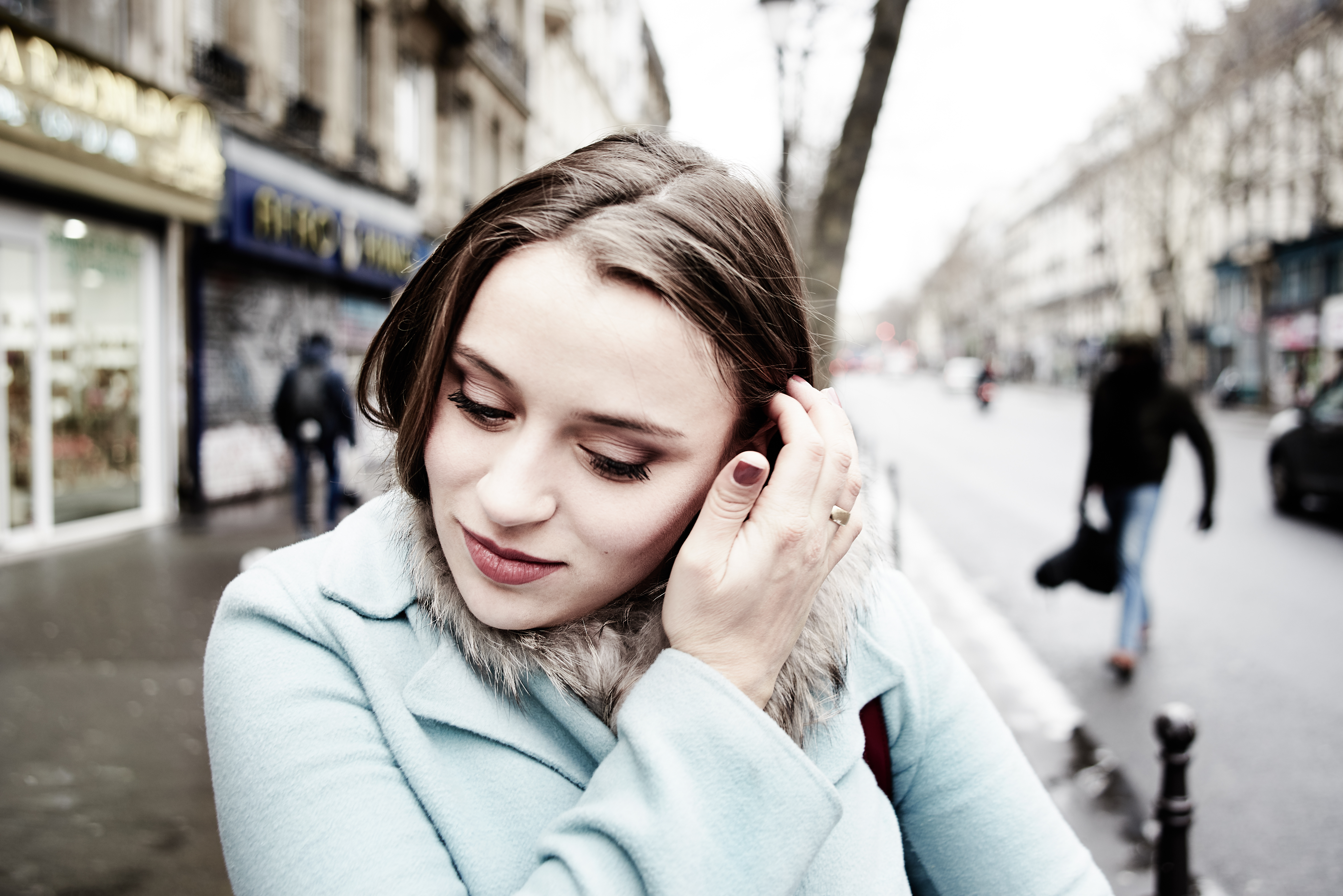 Esther Dierkes (Photo: Matthias Baus)